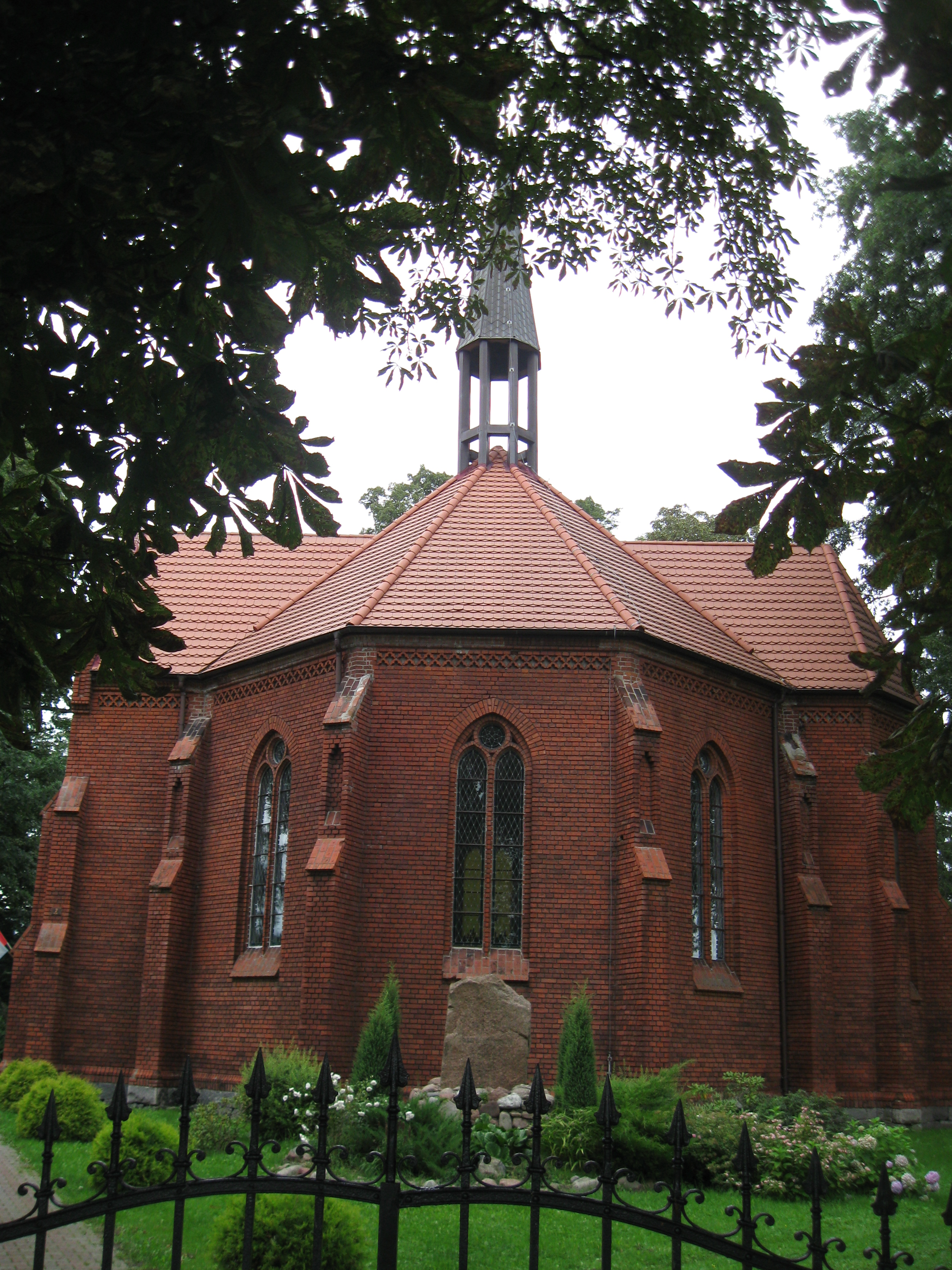 Trzynik - pałacowa kaplica ewangelicka, obecnie rzymskokatolicki kościół filialny p.w. św. Kazimierza, 1 poł. XIX